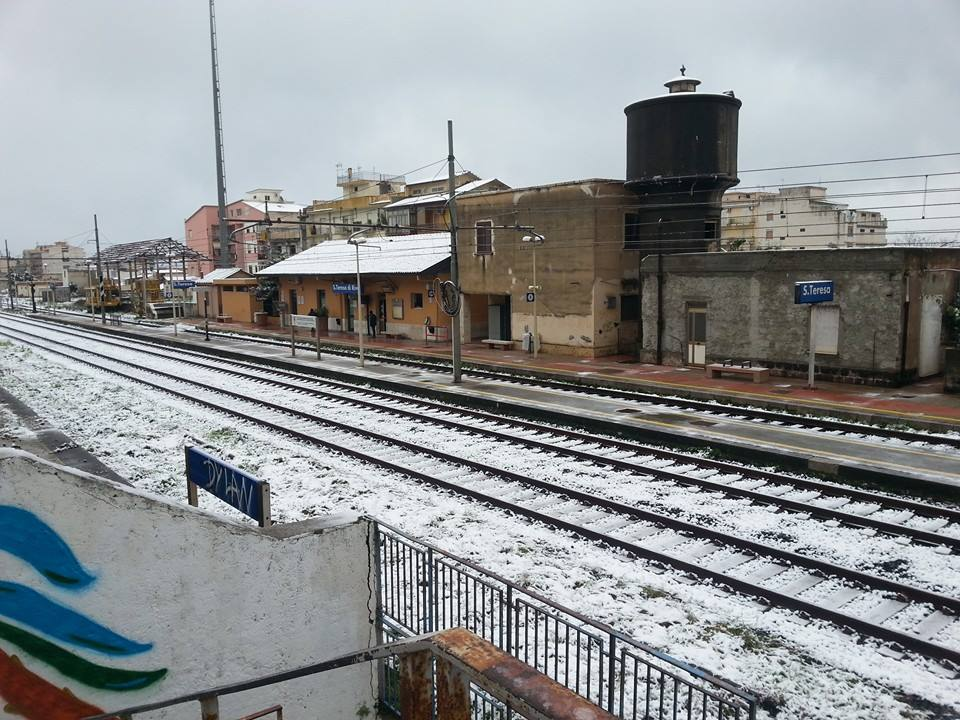 Stazione ferroviaria di Santa Teresa di Riva.